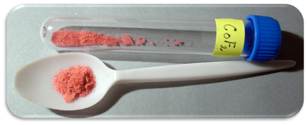 Fluorid kobaltnatý - CoF2